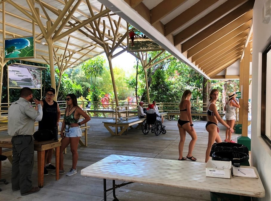 Recepción del Parque Nacional Manuel Antonio, Costa Rica. Con facilidades para todo tipo de personas con necesidades especiales, conecta al Sendero Universal que a su vez comunica a 7,5km de senderos y 7 playas con múltiples miradores y nichos ecológicos. Diseñados por Ibo Bonilla